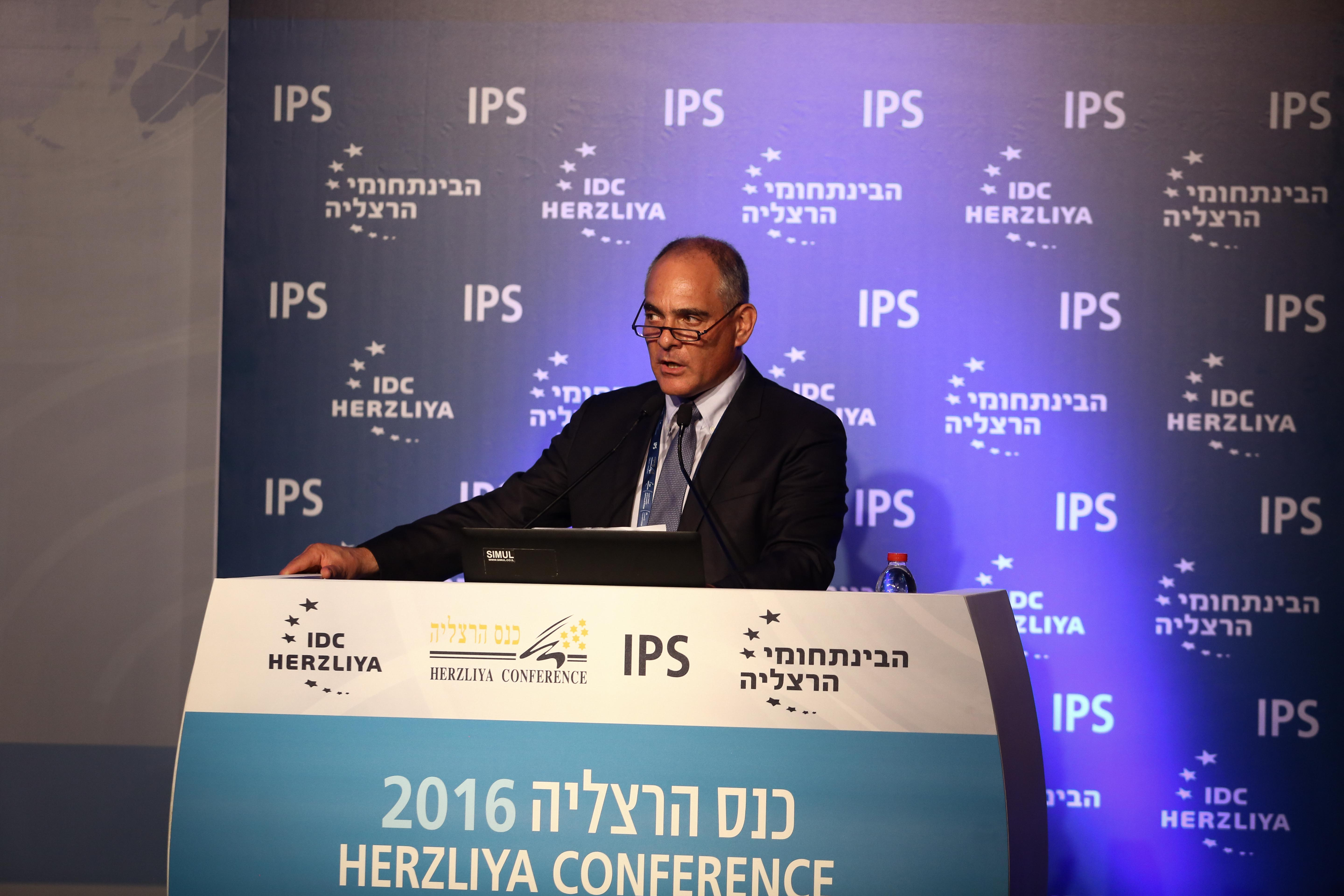 רונן הופמן בכנס הרצליה 2016 של המכון למדיניות ואסטרטגיה במרכז הבינתחומי הרצליה